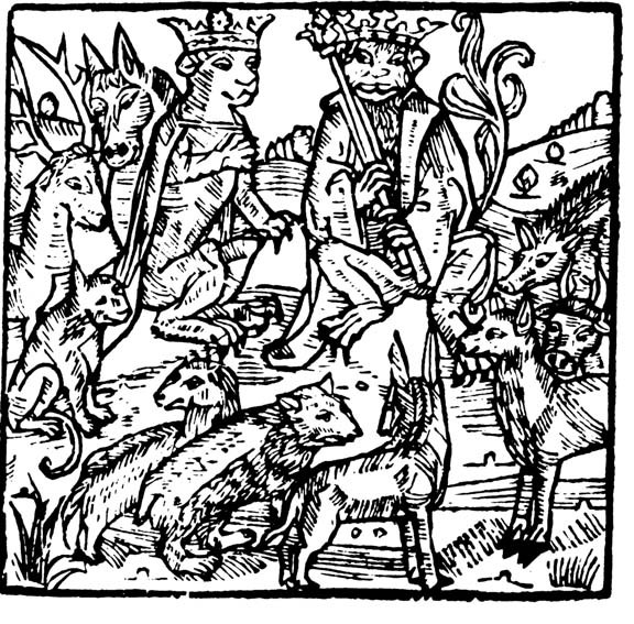 Illustration aus der von Hans van Ghetelen 1498 in Lübeck gedruckten Ausgabe, 1. Buch, 1. Kapitel; Holzschnitt